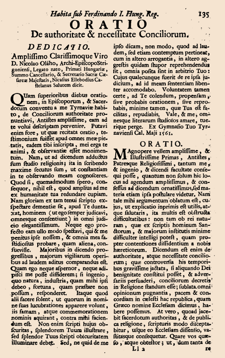 Sacra concilia Ecclesiæ Romano-Catholicæ in regno Hungariæ celebrata ab anno Christi MXVI. usque ad annum MDCCXV. (ad an̄um MDCCXXXIV.). Accedunt regum Hungariæ, & Sedis apostolicæ legatorum constitutiones ecclesiasticæ. Ex MSS. eruit, collegit, illustr. C. Péterfy, 1742